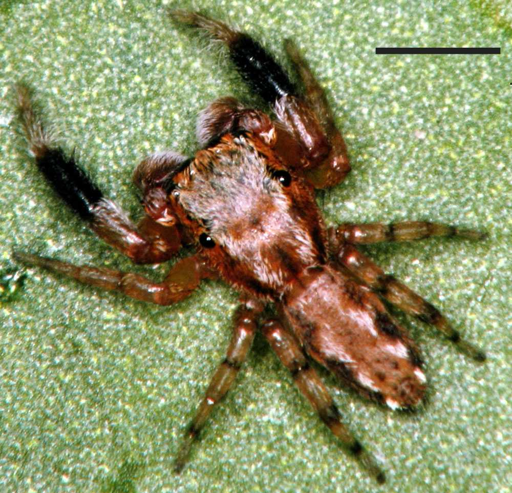 Male Marpissa sulcosa jumping spider from Gainesville, Alachua County, Florida, USA